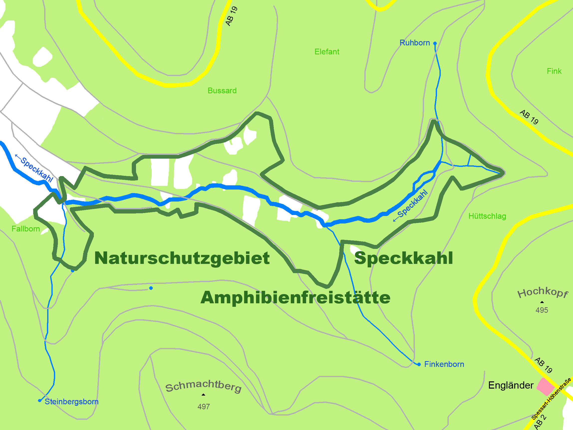 Karte des Naturschutzgebietes Amphibienfreistätte Speckkahl bei Sommerkahl, Bayern Grünfläche, Wiesen Siedlungsfläche Wald Gewässer Berg 497 Höhe über Normalhöhennull Feld- und Waldwege Naturschutzgebietsgrenze Kreisstraßen Fink Flurname Quelle